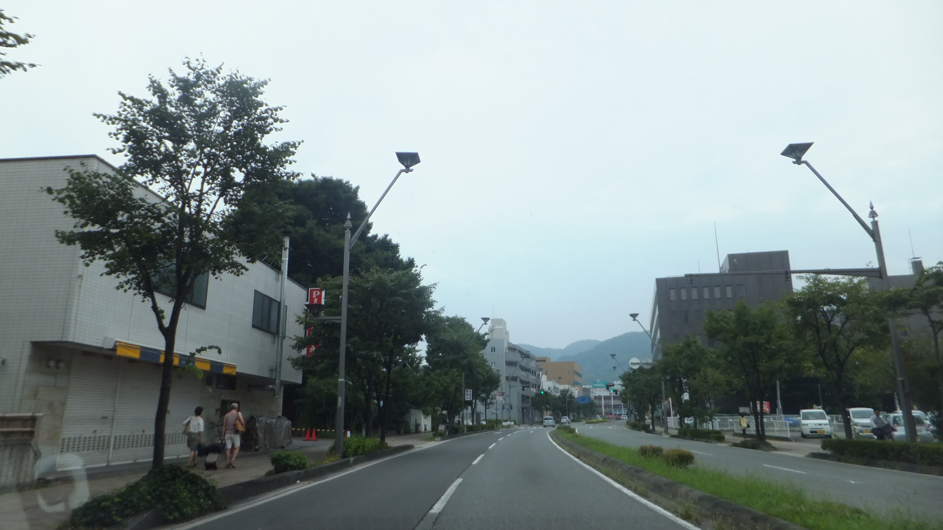 長野県長野市中御所1丁目